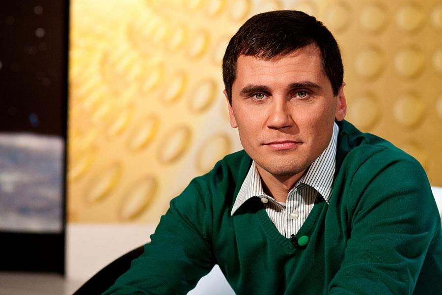 Meelis Kompus ETV saates Tähelaev